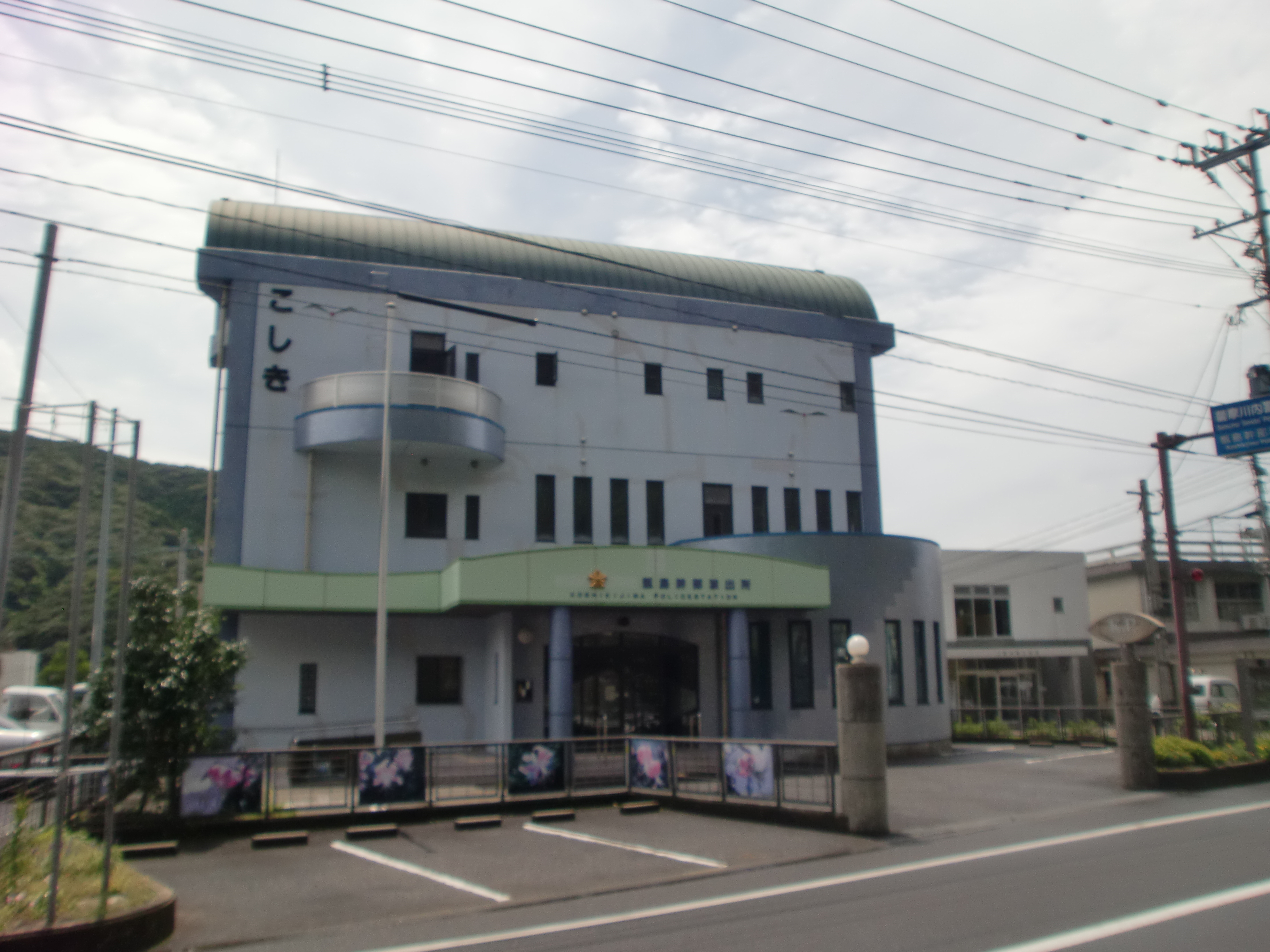 薩摩川内警察署甑島幹部派出所の外観。